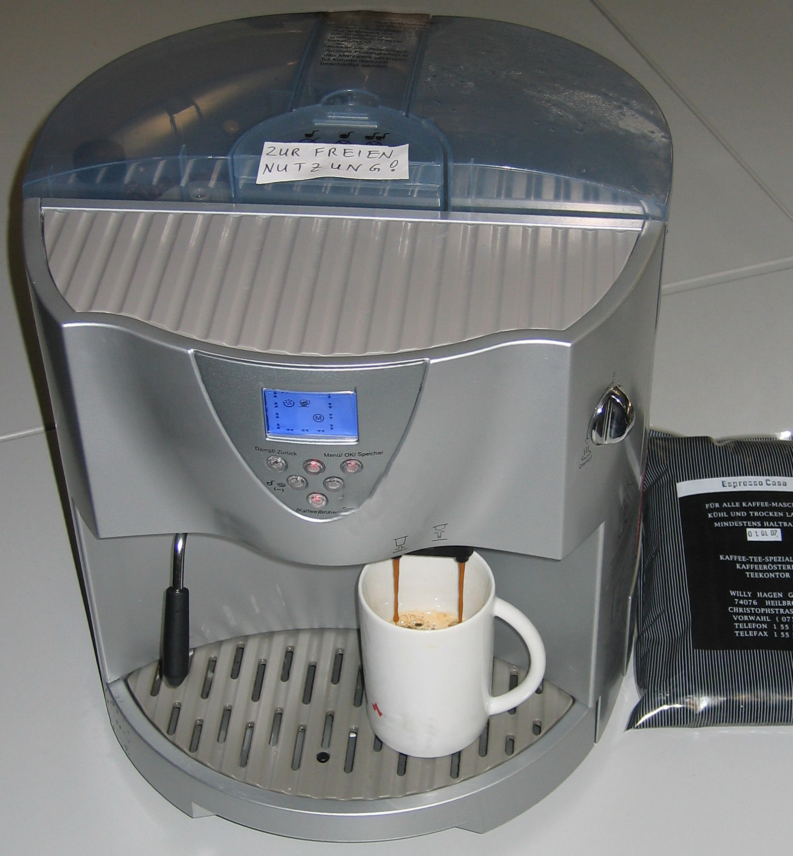 ... Genehmigung:siehe unten Nachbearbeitung: Johann H. Addicks Anmerkung: Ich habe diverse Aufkleber und Markenlogos von der der Maschine wegretouchert. Wenn's jemand besser machen möchte, das Originalbild liegt hier, Lizenz identisch.